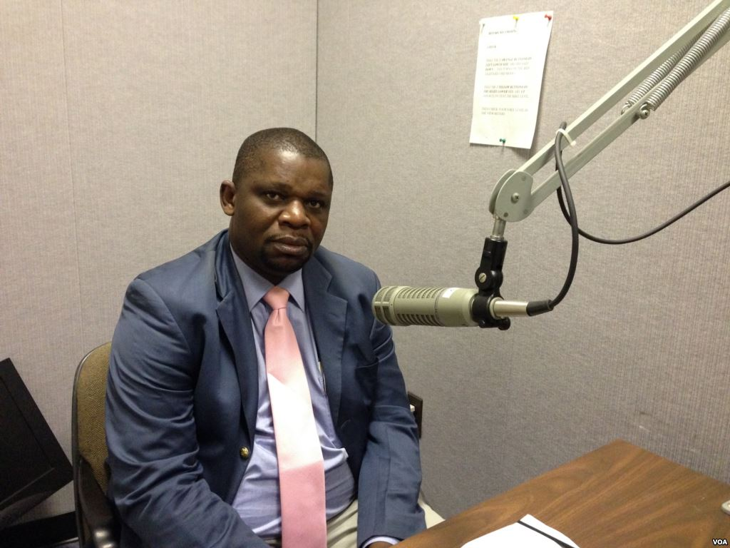 Mathias Morouba, dans les studios de la VOA, mars 2014.